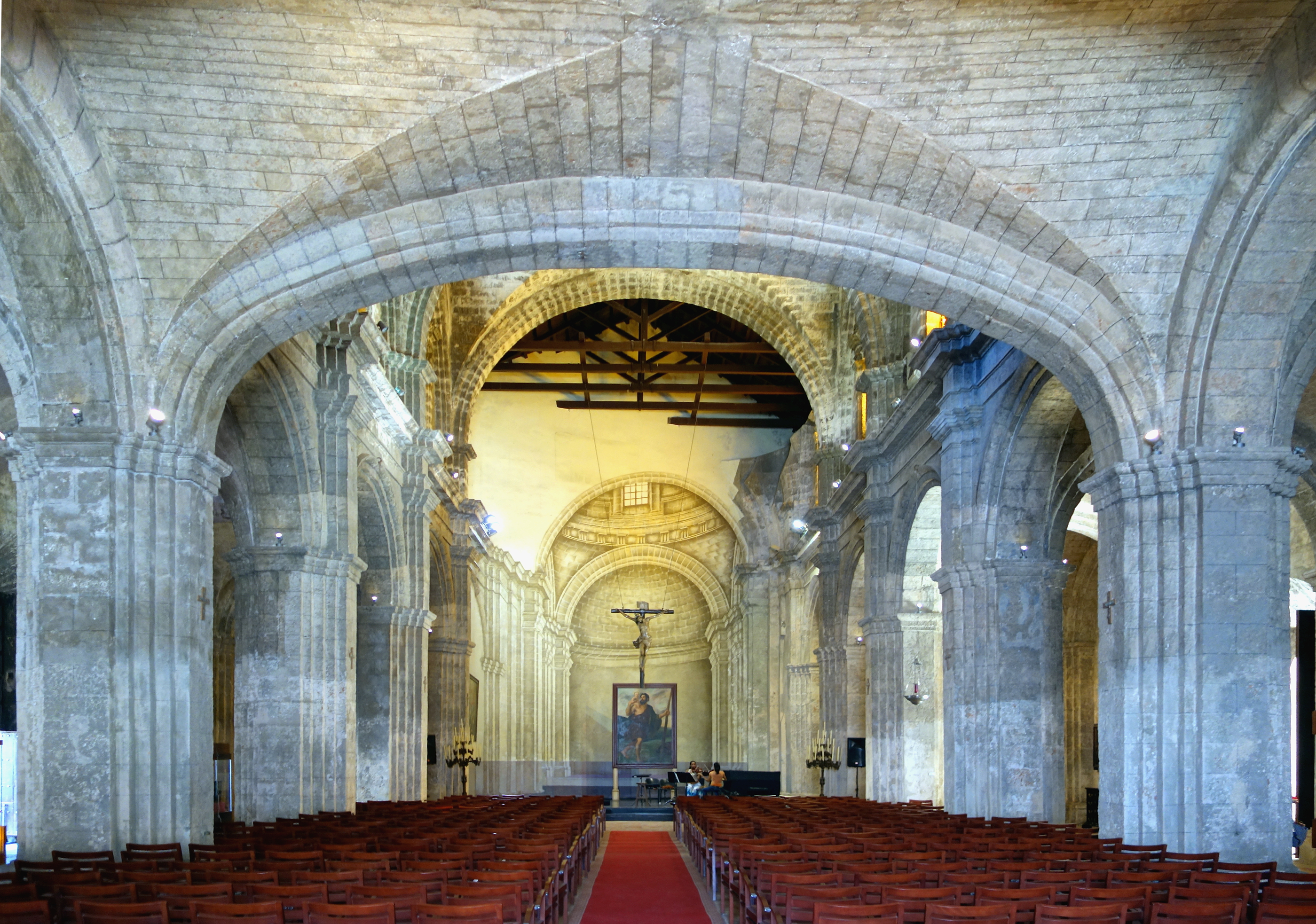 La nef de la Basilica Menor de San Francisco de Asis à La Havane.